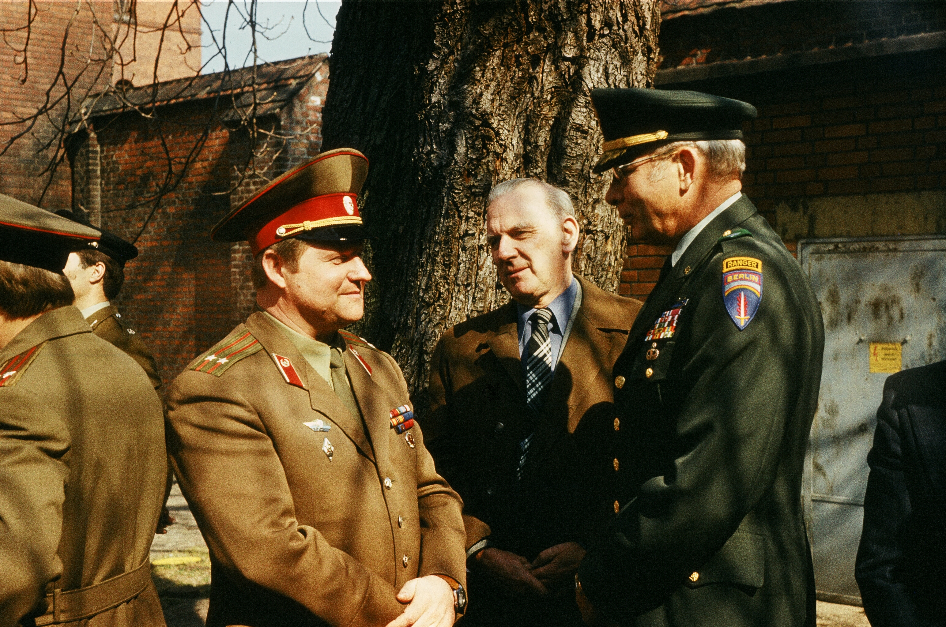 Германия Западный Берлин Шпандау. Союзники комбриги при смене караулов в тюрьме Шпандау.01.04.1992